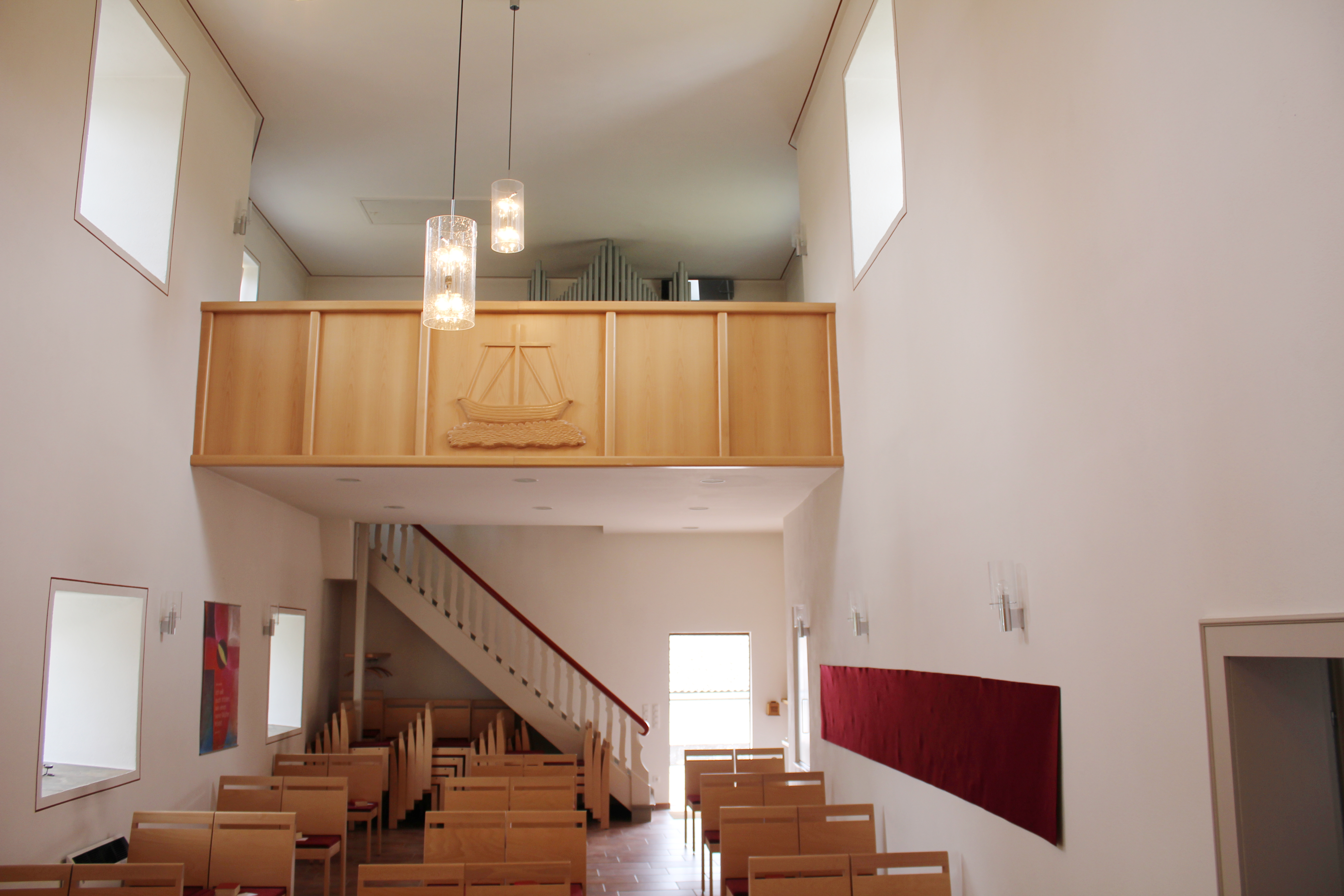 Evangelische Kirche Neukirchen, Braunfels, Lahn-Dill-Kreis, Hessen, Deutschland